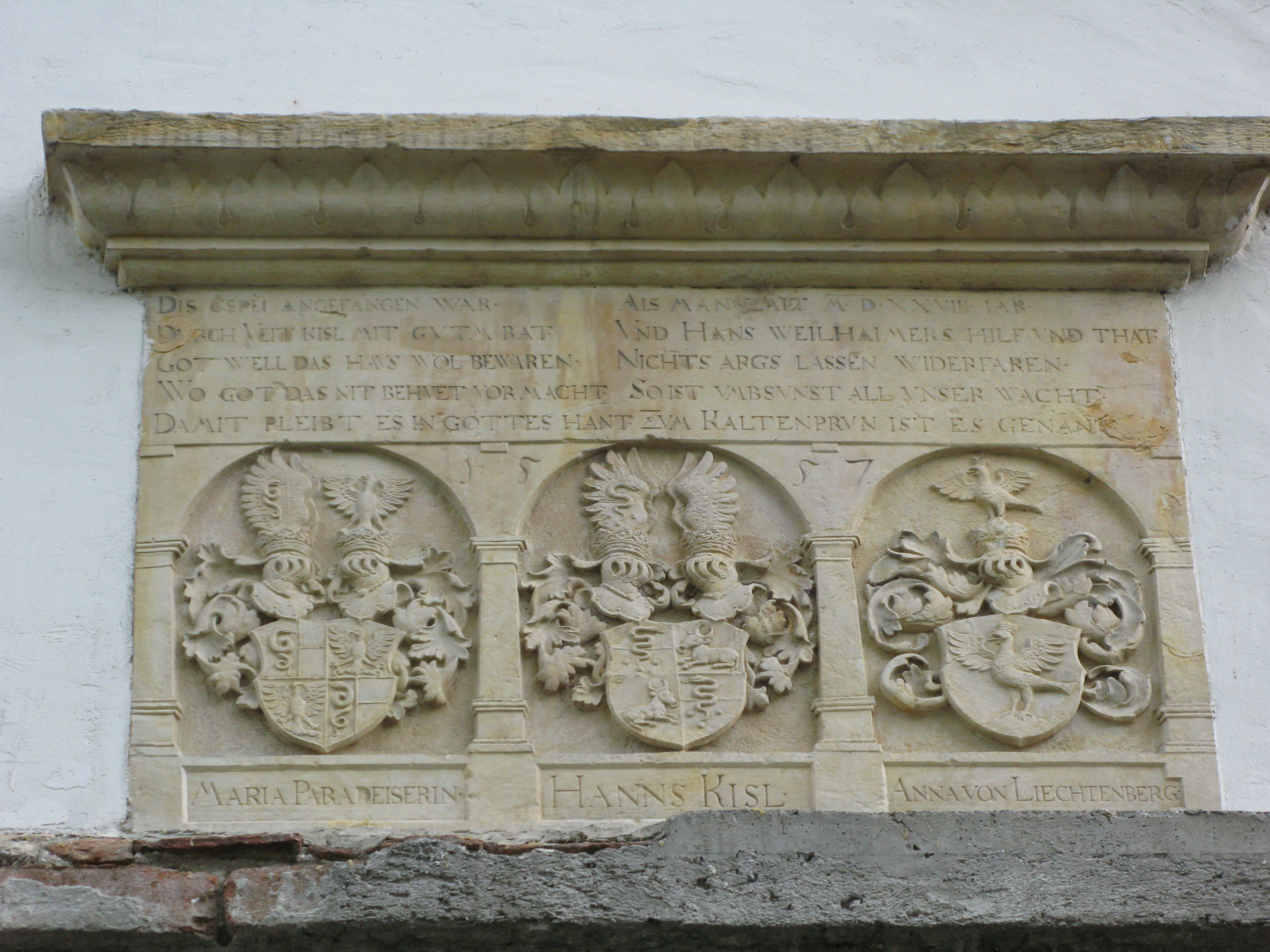 Grb nad ulazom u grad Fužine.Ljubljana.